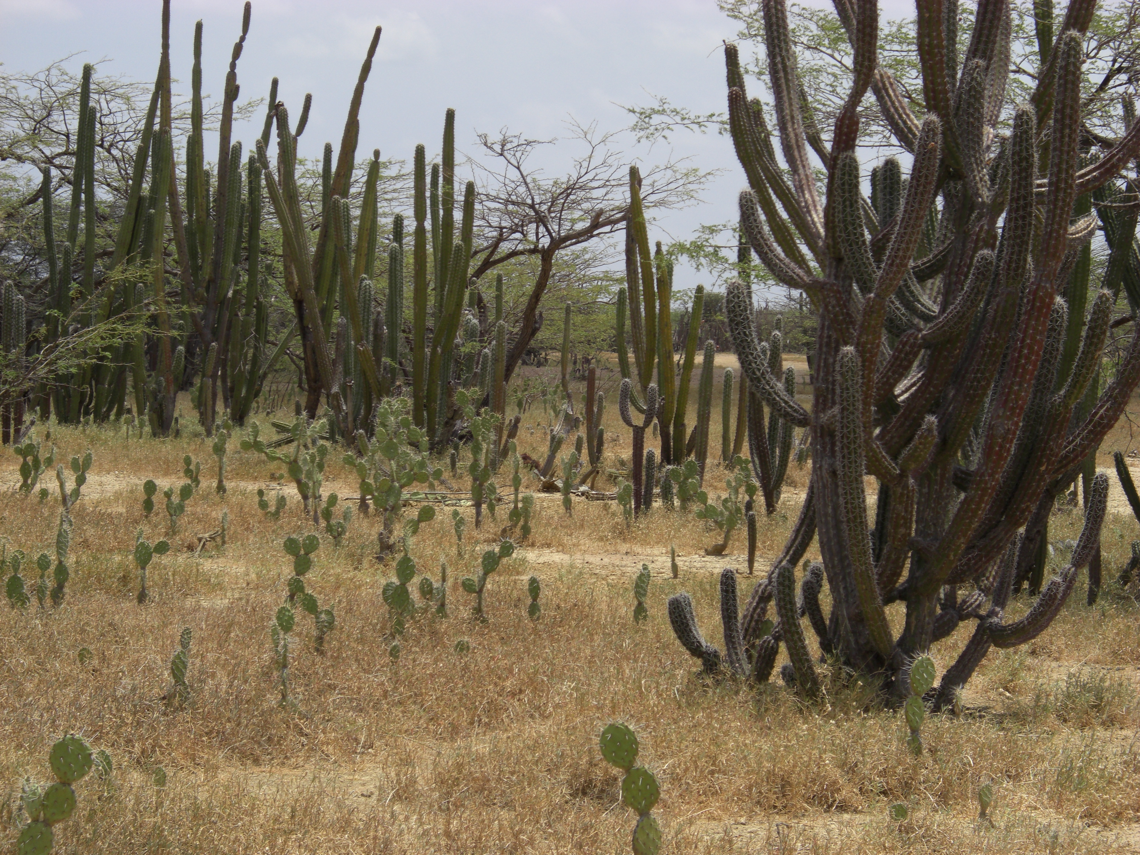 Vejetación Guajira